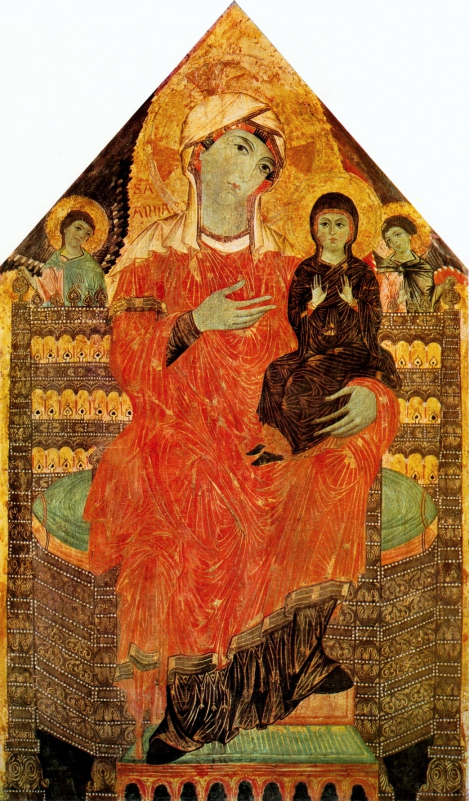 Св_Анна_Мастер_Сан_Мартино